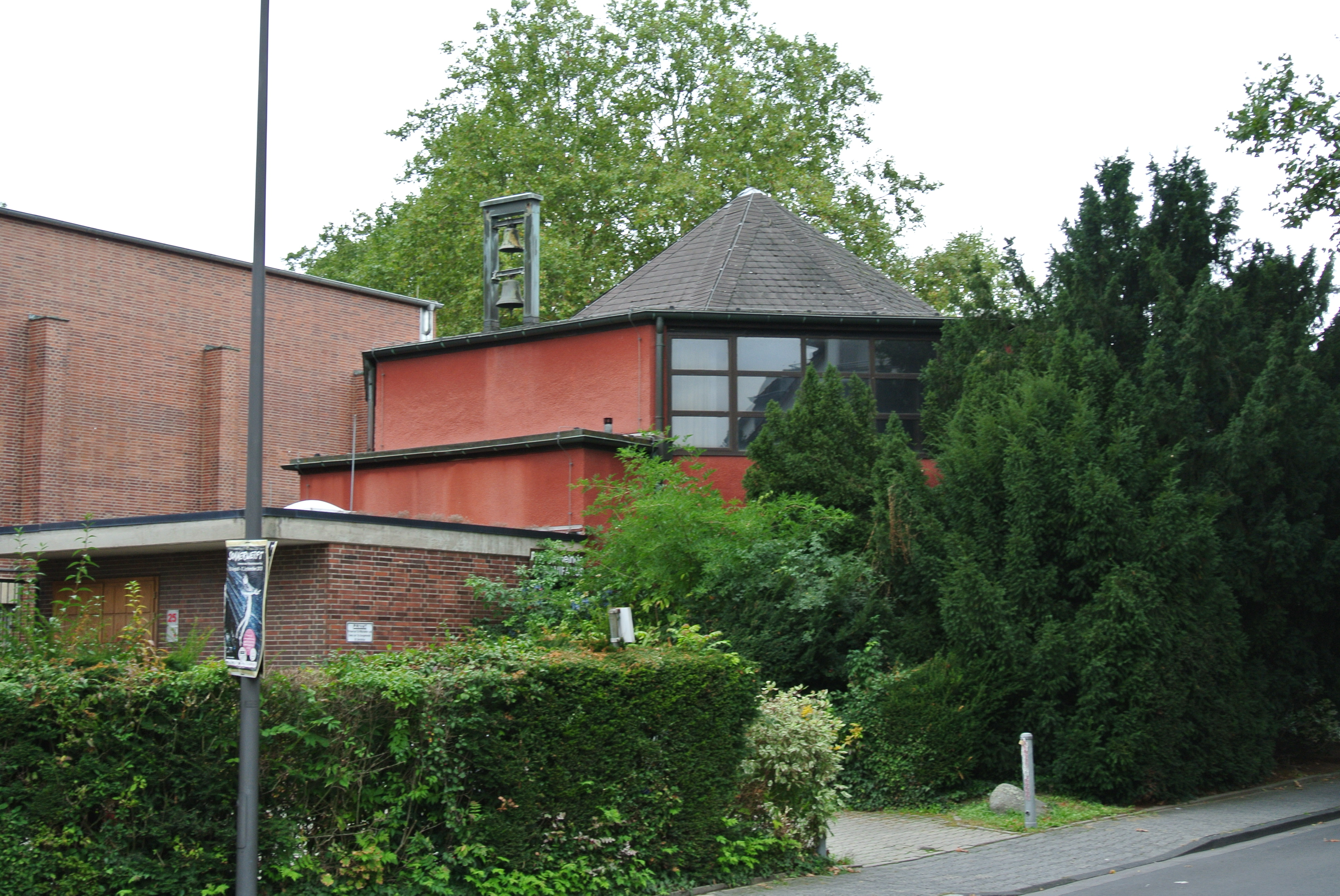 Katholische Bonifatius-Kapelle des Architekten Martin Weber von 1932